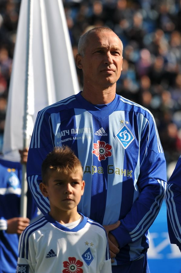 Олег Протасов на Матчі пам'яті Белькевича, Баля і Гусіна